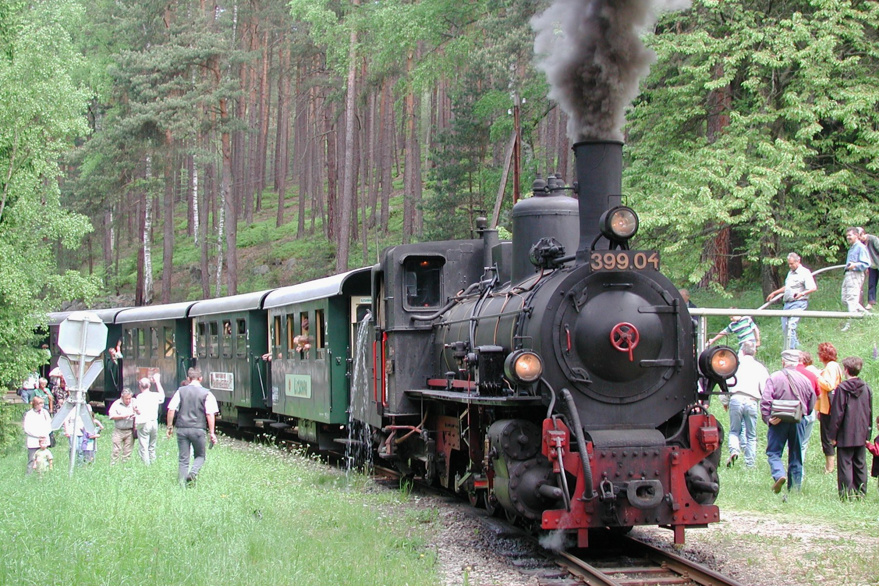 en: ÖBB 399.04 taking water at Bruderndorf, summit of the Waldviertel Narrow Gauge Railway line to Groß Gerungs, Lower Austria de: ÖBB 399.04 beim Wasserfassen in Bruderndorf, dem Scheitelpunkt der Strecke der Waldviertler Schmalspurbahnen nach Groß Gerungs